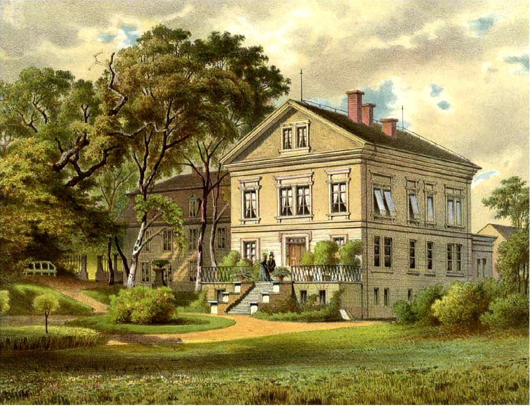 Rittergut Roitzsch, Kreis Torgau, Lithographie von Alexander Duncker